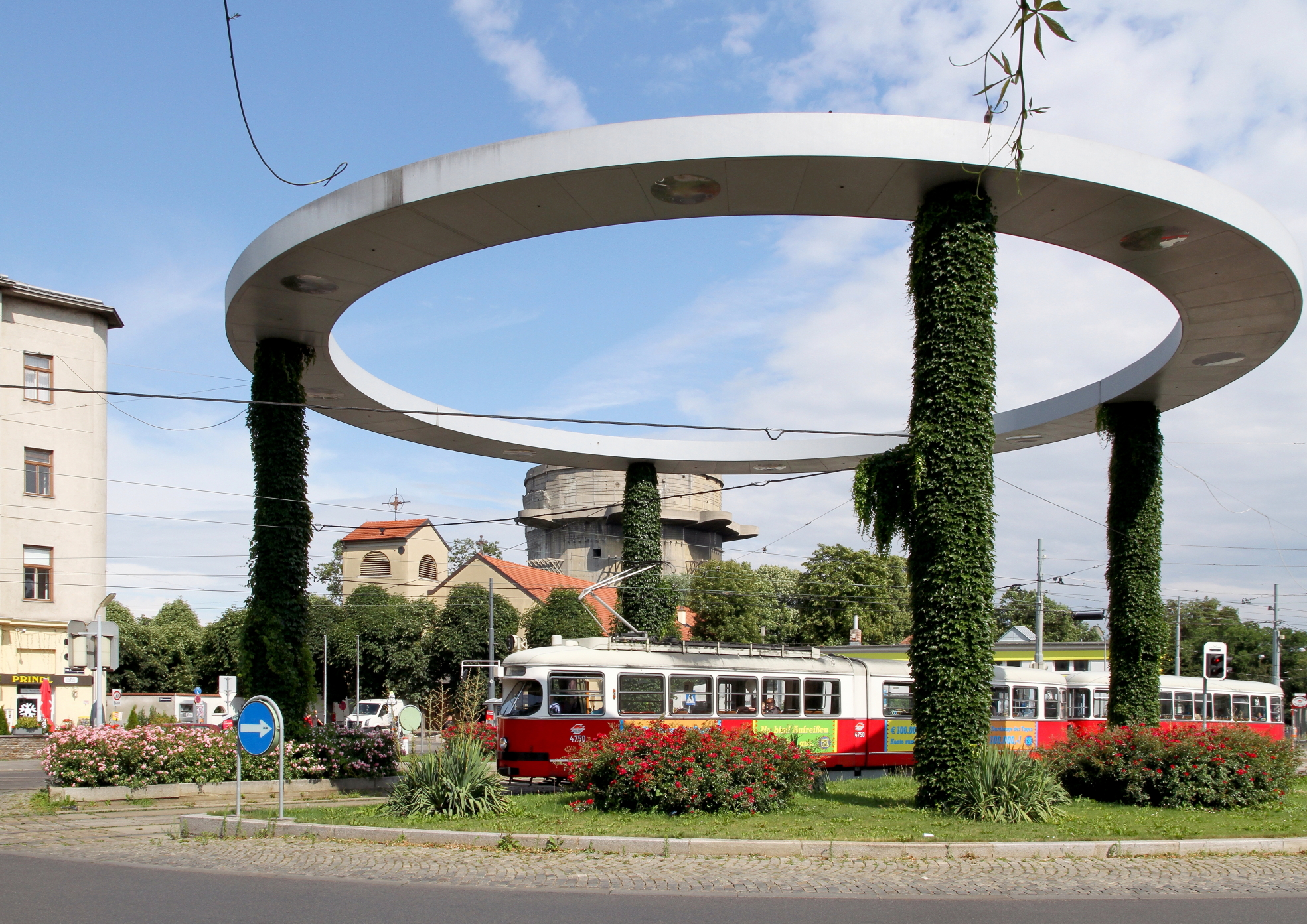 Der Gaußplatz im 20. Wiener Gemeindebezirk Brigittenau. Im Hintergrund der Gefechtsturm (Flakturm) aus dem II. Weltkrieg im Augarten und die Muttergotteskirche.